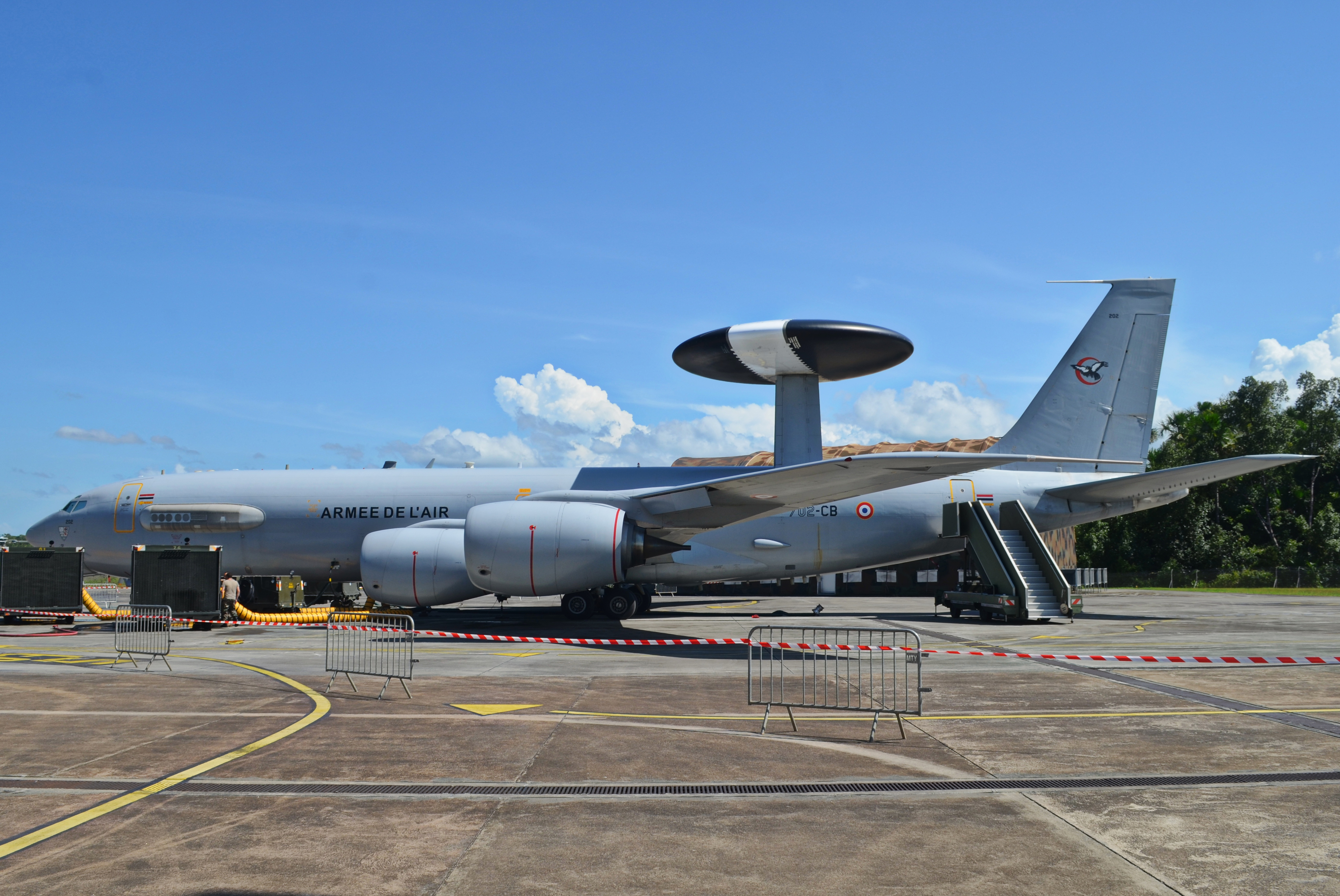 Boeing E-3F immatriculé F-UJCB, il porte l'insigne de l’escadrille BR 43 "Charognard".